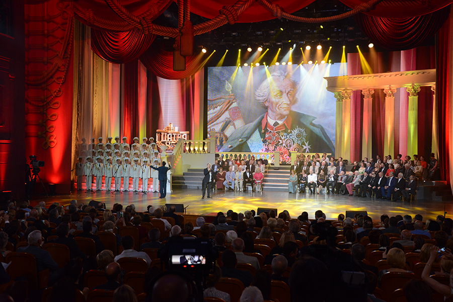 85-летие Центрального академического театра Российской армии